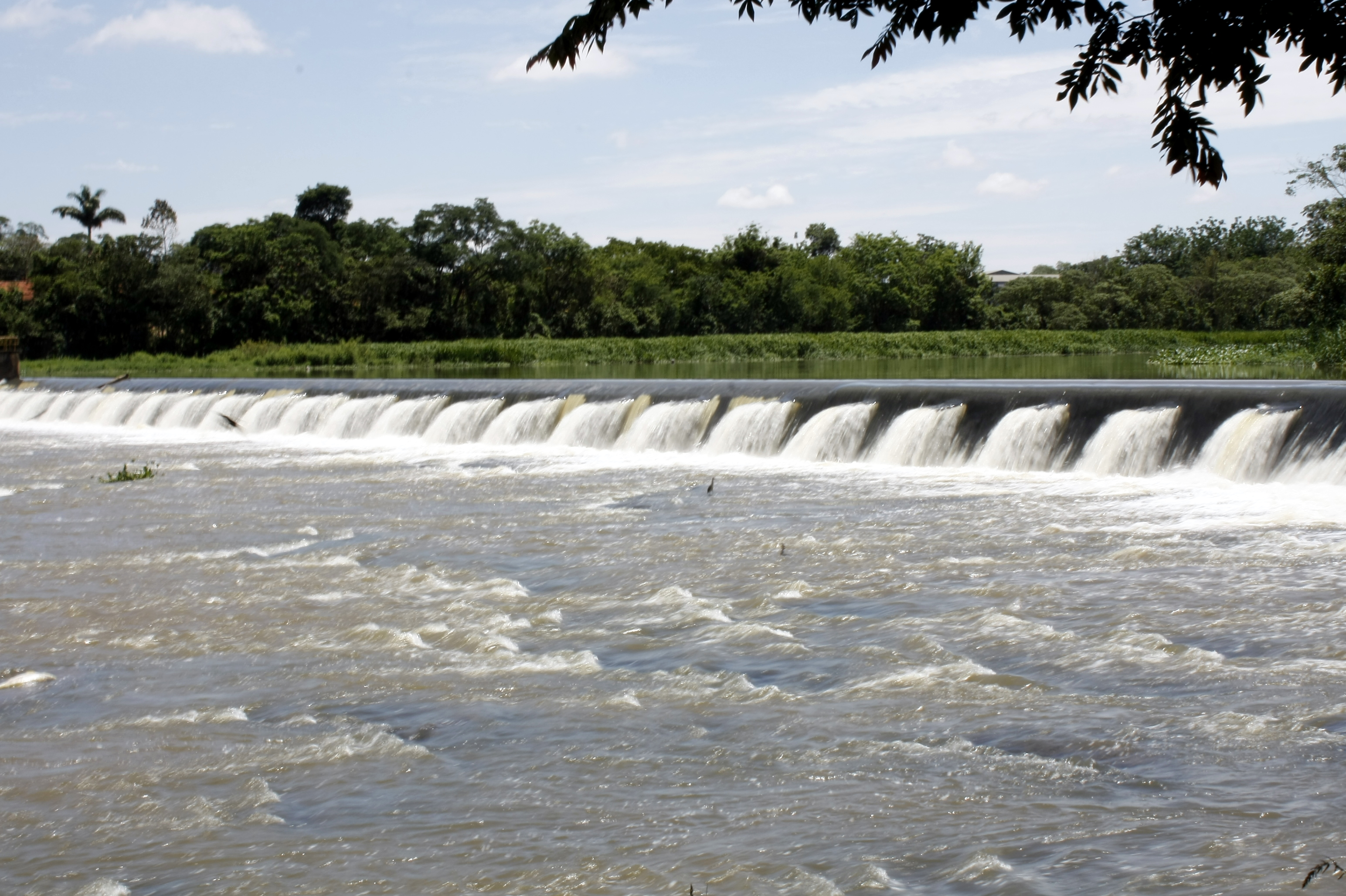 Cachoeira em Pirassununga - SP